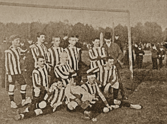 Die Fußballmannschaft des SC Diana Kattowitz im Jahr 1909.